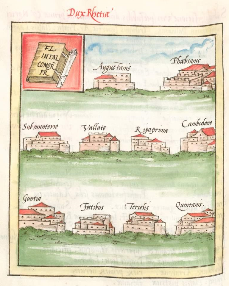 Miniatur aus der Notitia Dignitatum, Münchner Codex, Darstellung der Kastelle der röm. Provinz Raetien